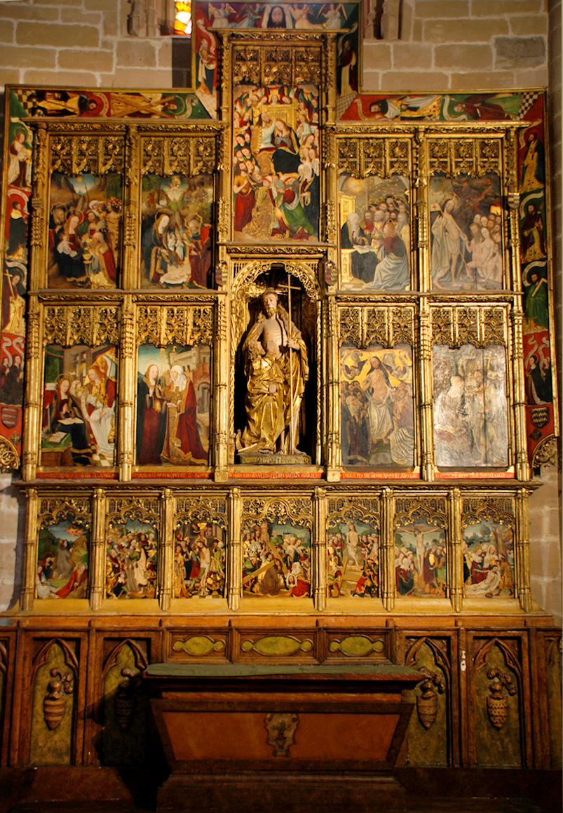 Retablo de Santo Tomás, catedral de Pamplona